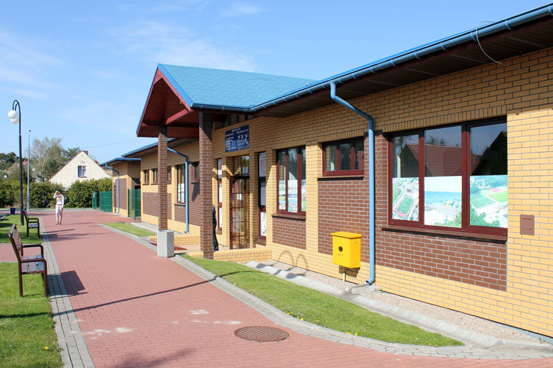 Das Sport- und Gemeindezentrum in Pobierowo. Hier ist auch die Bike-Station des Rewal-Bike-Systems untergebracht.